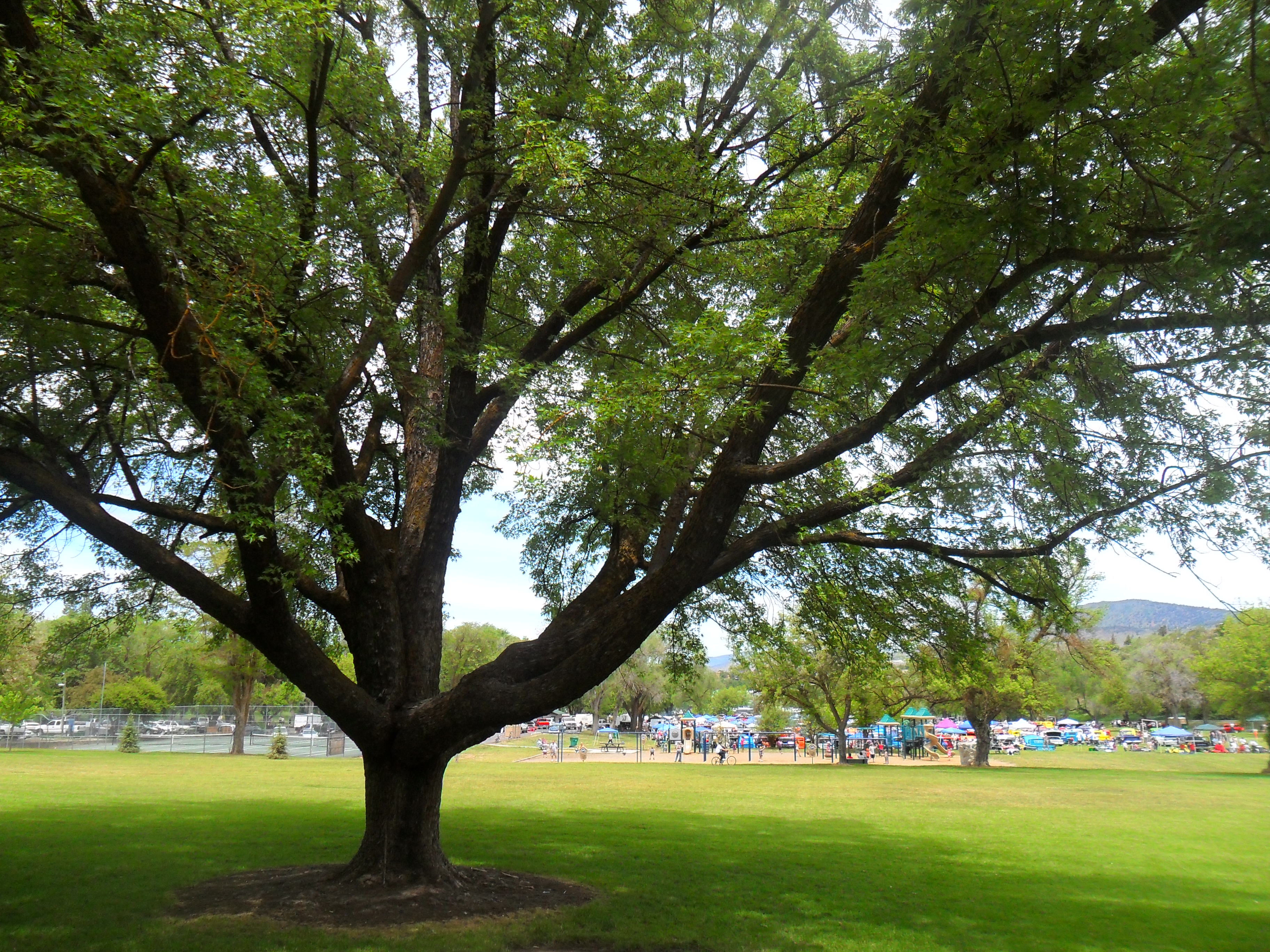 Moore Park field, car show in the background. Klamath Falls, Oregon